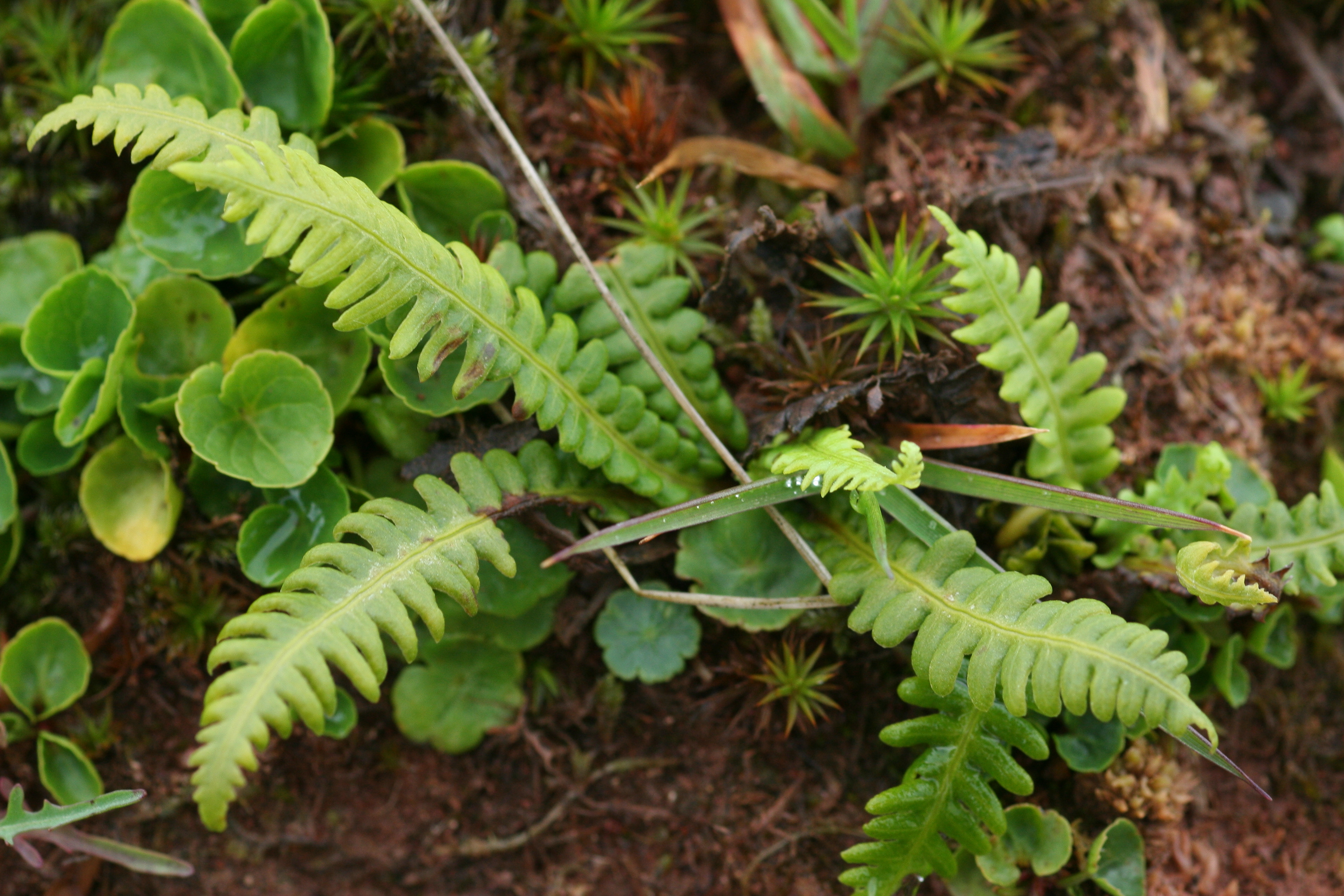 Källkambräken - Blechnum spicant var.fallax0126